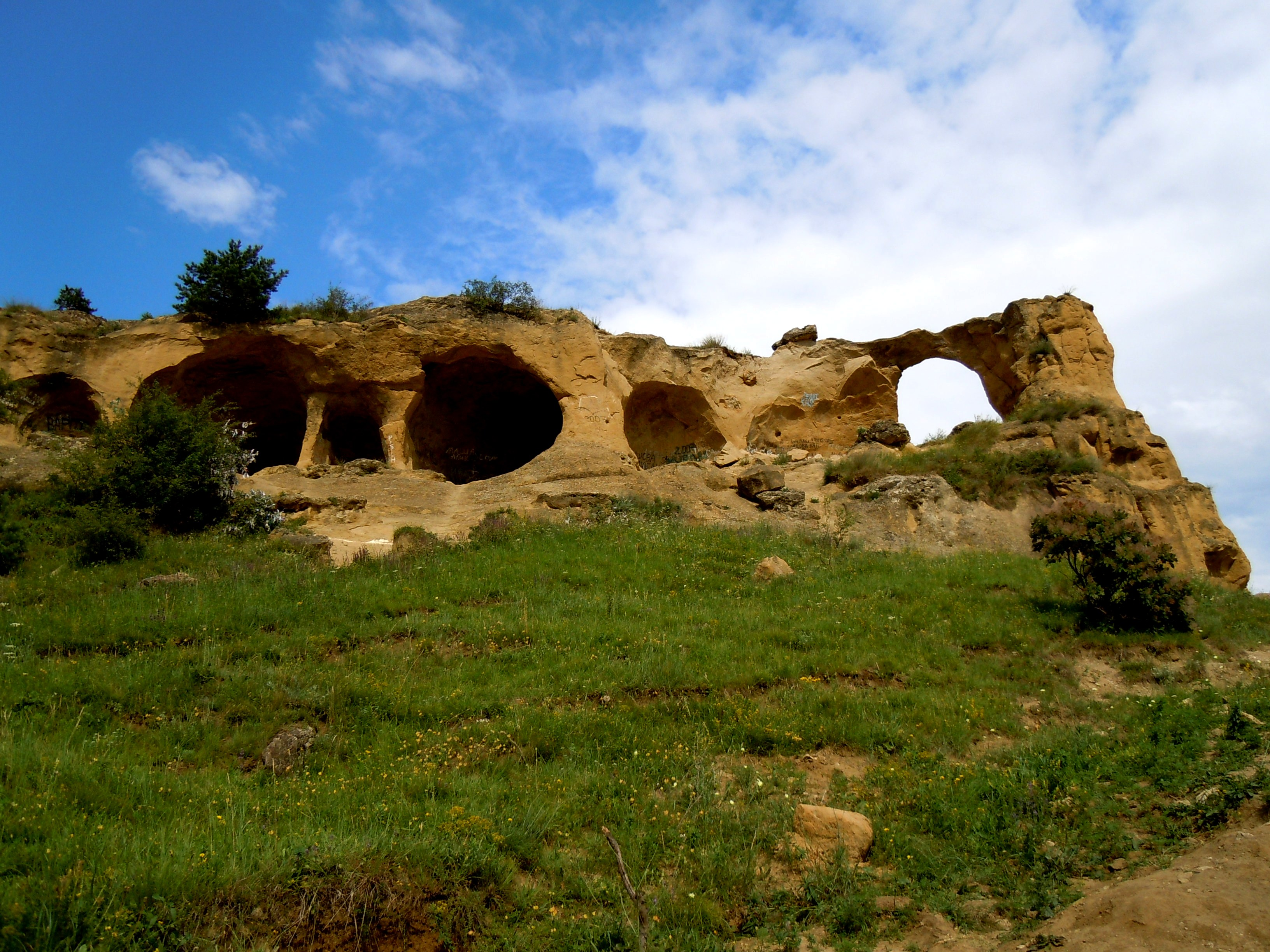 Кольцо-гора, город Кисловодск This image is related to the protected area of Russia number 2610067